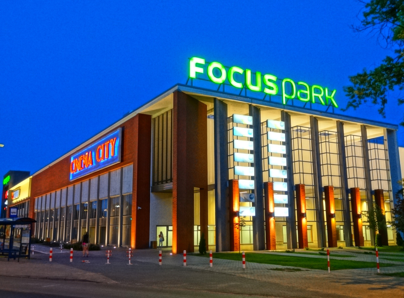 Centrum handlowe Focus Mall w Bydgoszczy przy ulicy Jagiellońskiej